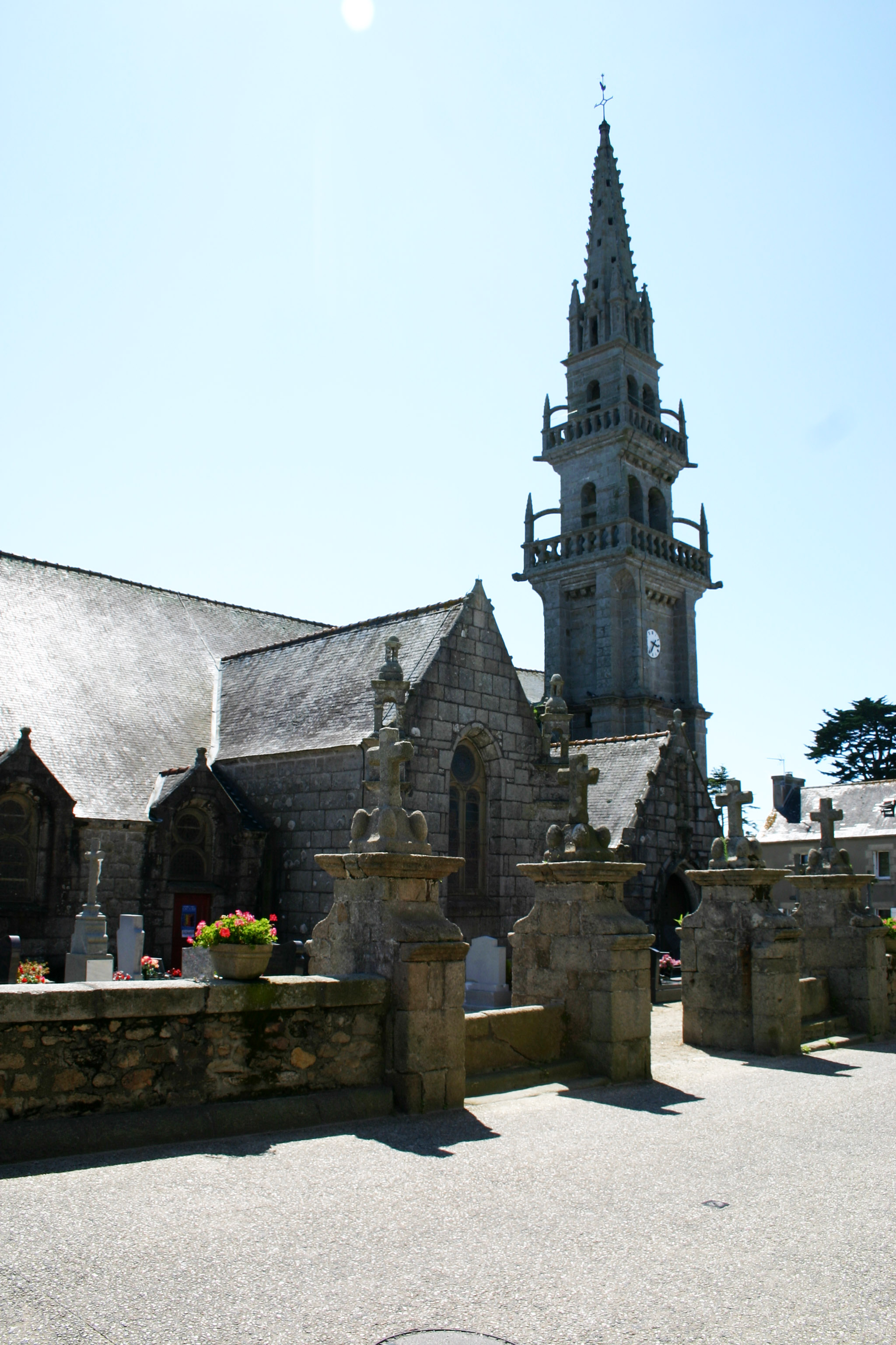 Enclos Eglise de Guissény Finistère France